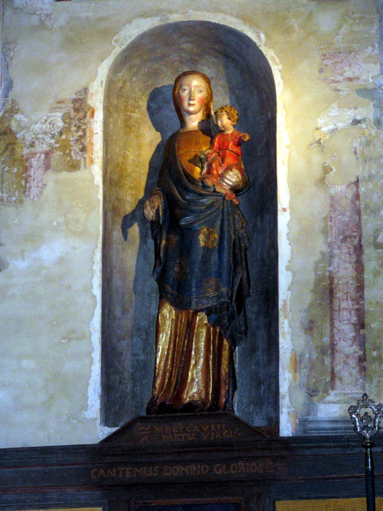 Asti, Chiesa di Santa Maria di Viatosto: interno, statua lignea raffigurante la Madonna col Bambino.